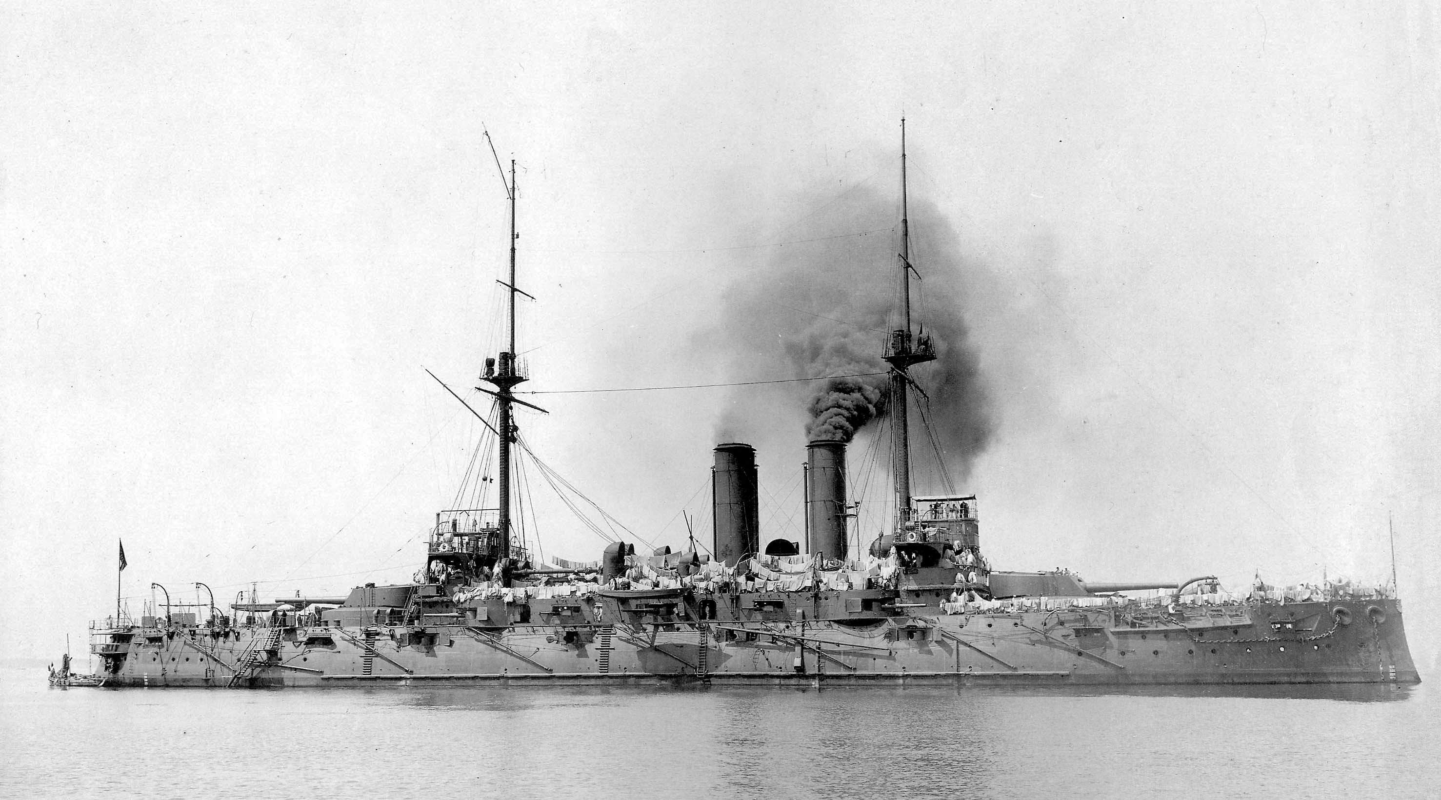 日本海軍戦艦敷島型「朝日 横須賀にて撮影。